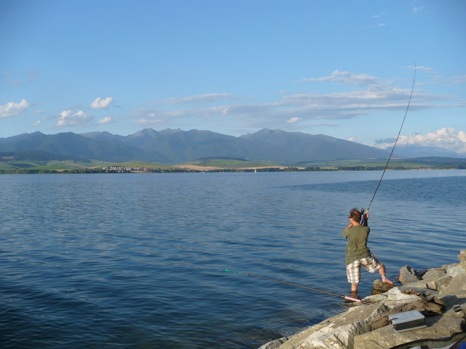 Verejná rekreačná oblasť vodná nádrž Liptovská Mara, región Liptov, okr.Liptovský Mikuláš